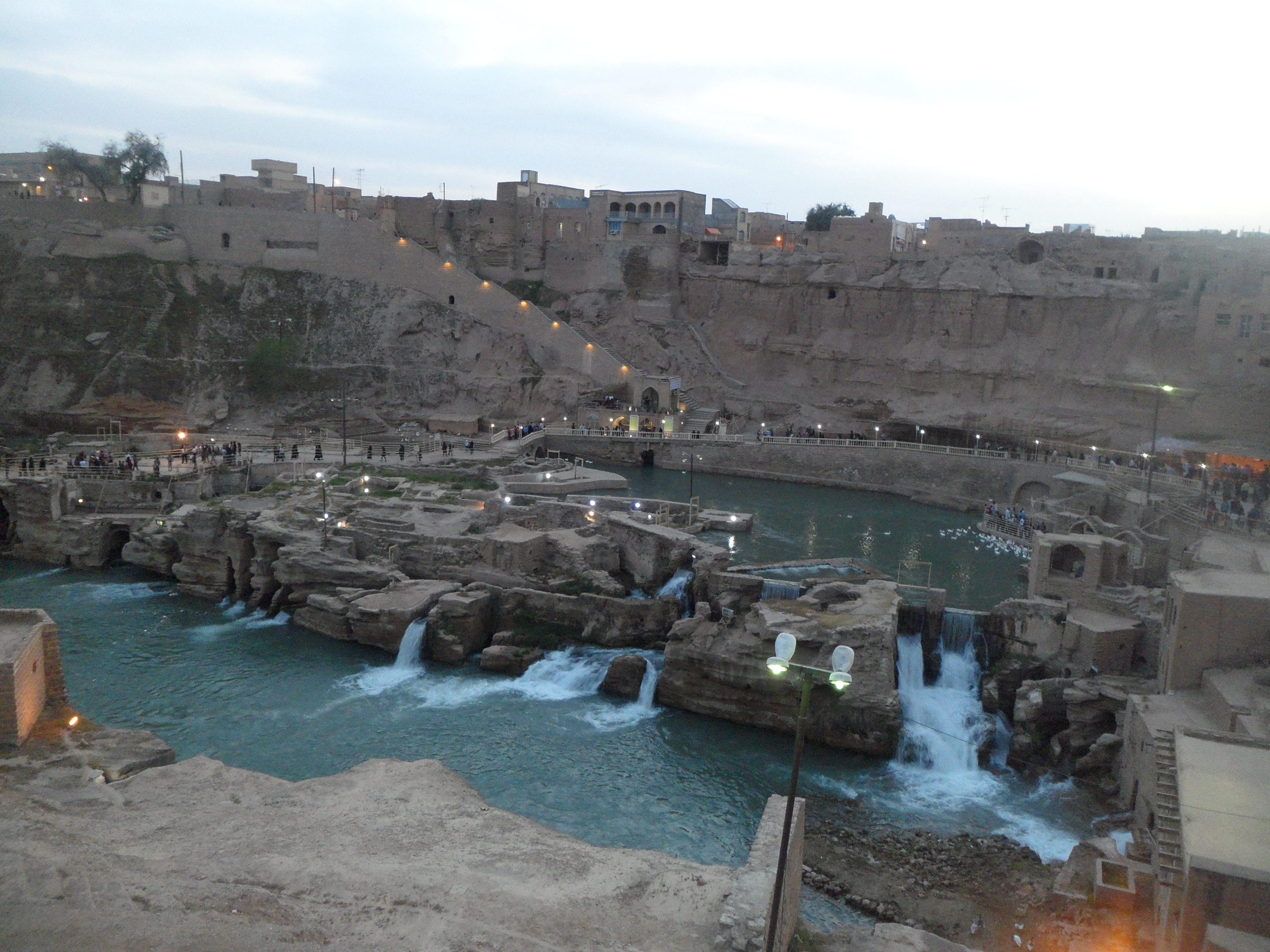 آبشارهای شوشتر از نمای دور